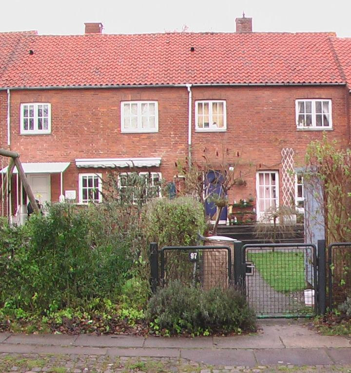 Blomstervænget i Lyngby. I et tilsvarende hus (nr.101) blev filmene: Far til fire optaget i 1950'erne